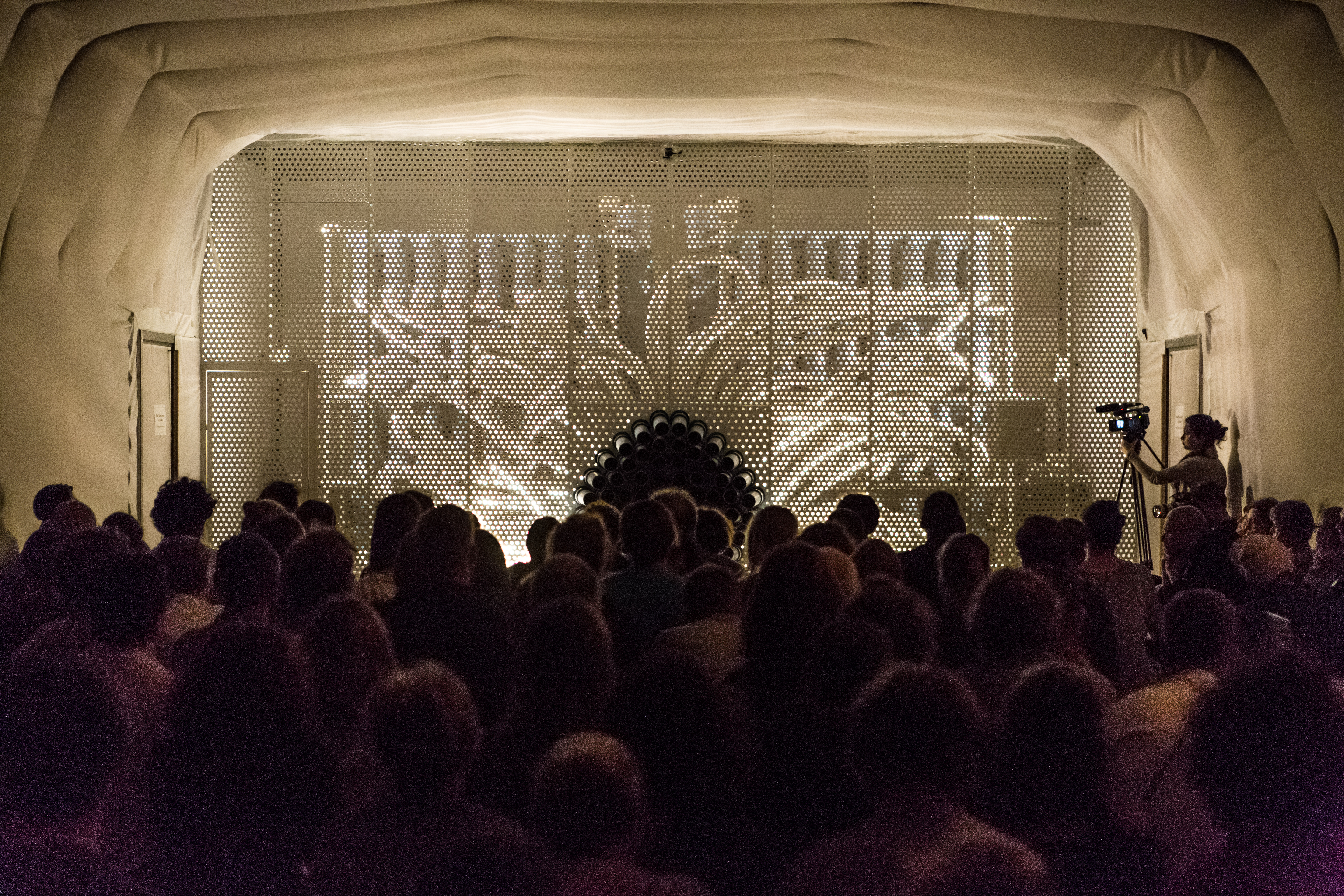 Fotocredits: Julian van Dieken Aufnahme vom 17.09.2016 in der St. Johannes-Evangelist-Kirche